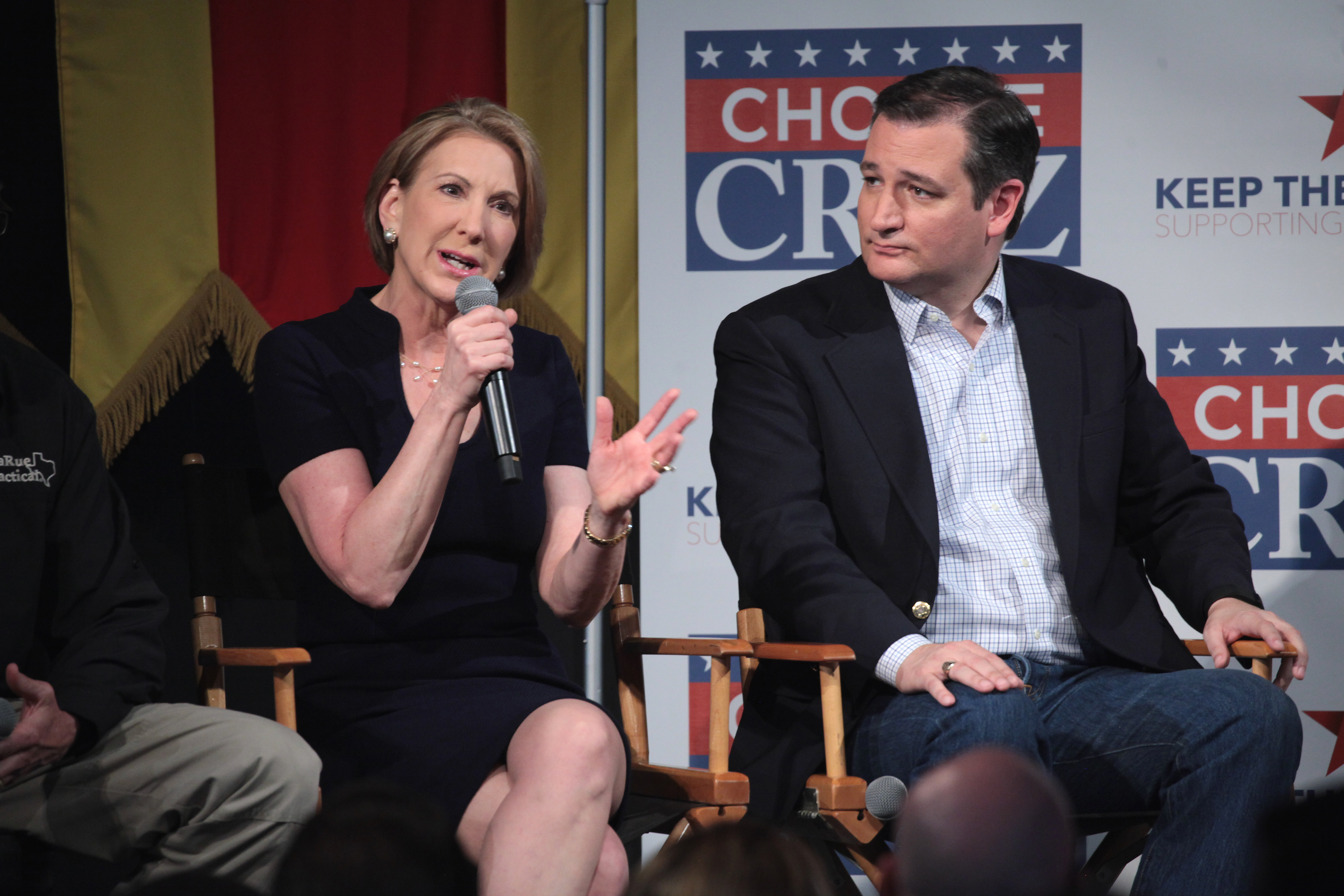 Carly Fiorina con Ted Cruz nel 2016